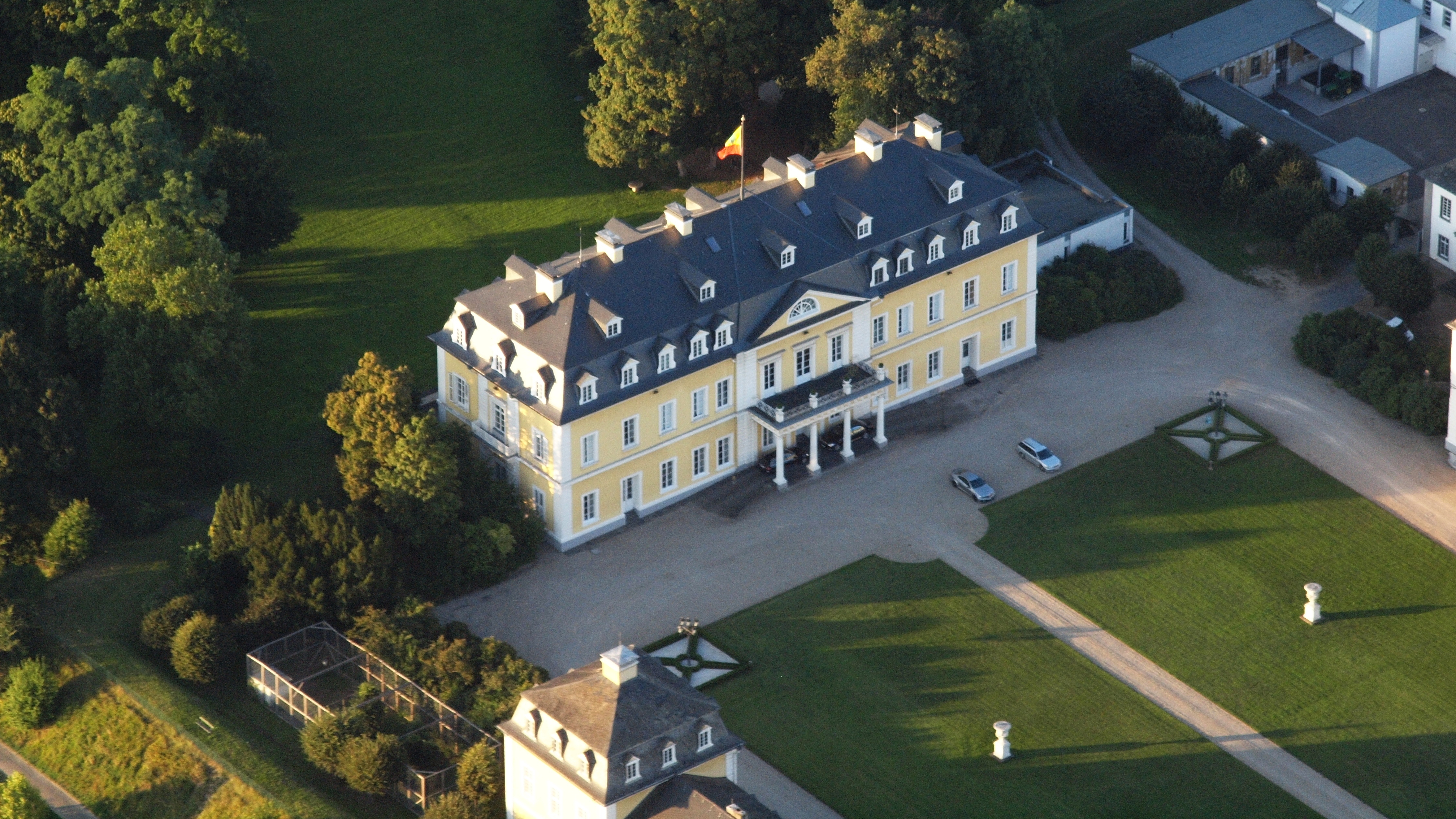 Schloss Neuwied: Luftaufnahme